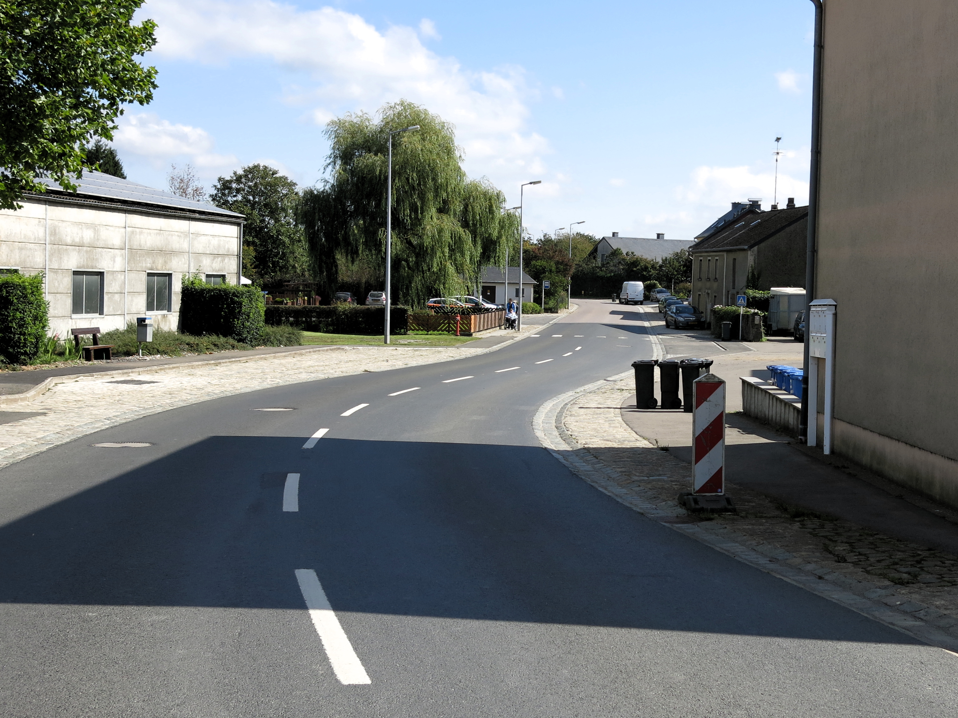 Den CR322 zu Holztem a Richtung Schinker.